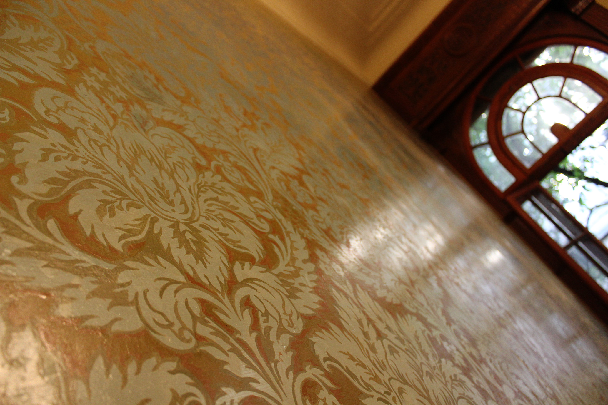 Detalhe da pintura na parede da Sala Piloto no térreo da Casa de Nhonhô Magalhães, localizada no bairro de Higienópolis, em São Paulo, Brasil. A Casa de Nhonhô Magalhães é um patrimônio histórico localizado na Avenida Higienópolis, no bairro de Higienópolis, em São Paulo, Brasil. O casarão pertenceu ao barão do café Carlos Leôncio Magalhães, que encomendou o projeto em 1927, pela construtora Siciliano & Silva. As obras foram concluídas em 1939 e o estilo eclético da casa foi inspirado nos palacetes franceses do século XIX.